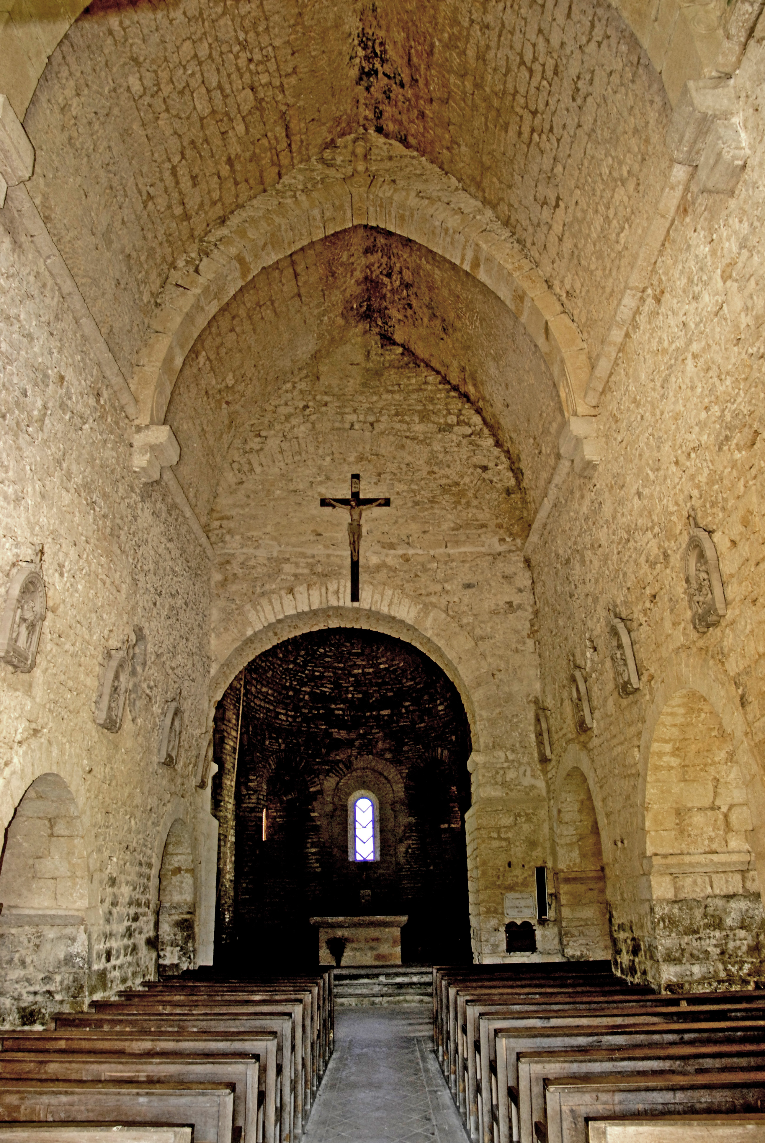 Saint-Hymetière, Mittelschiff